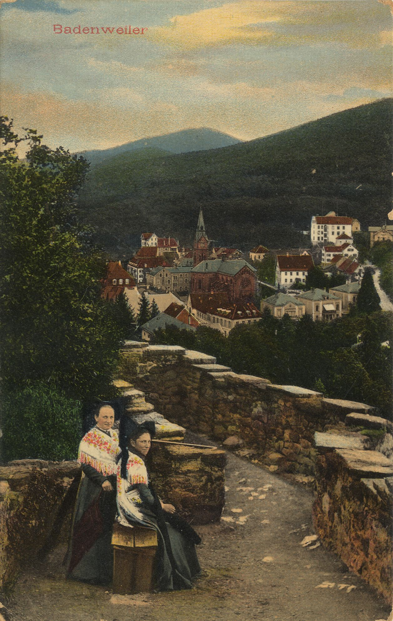 Badenweiler